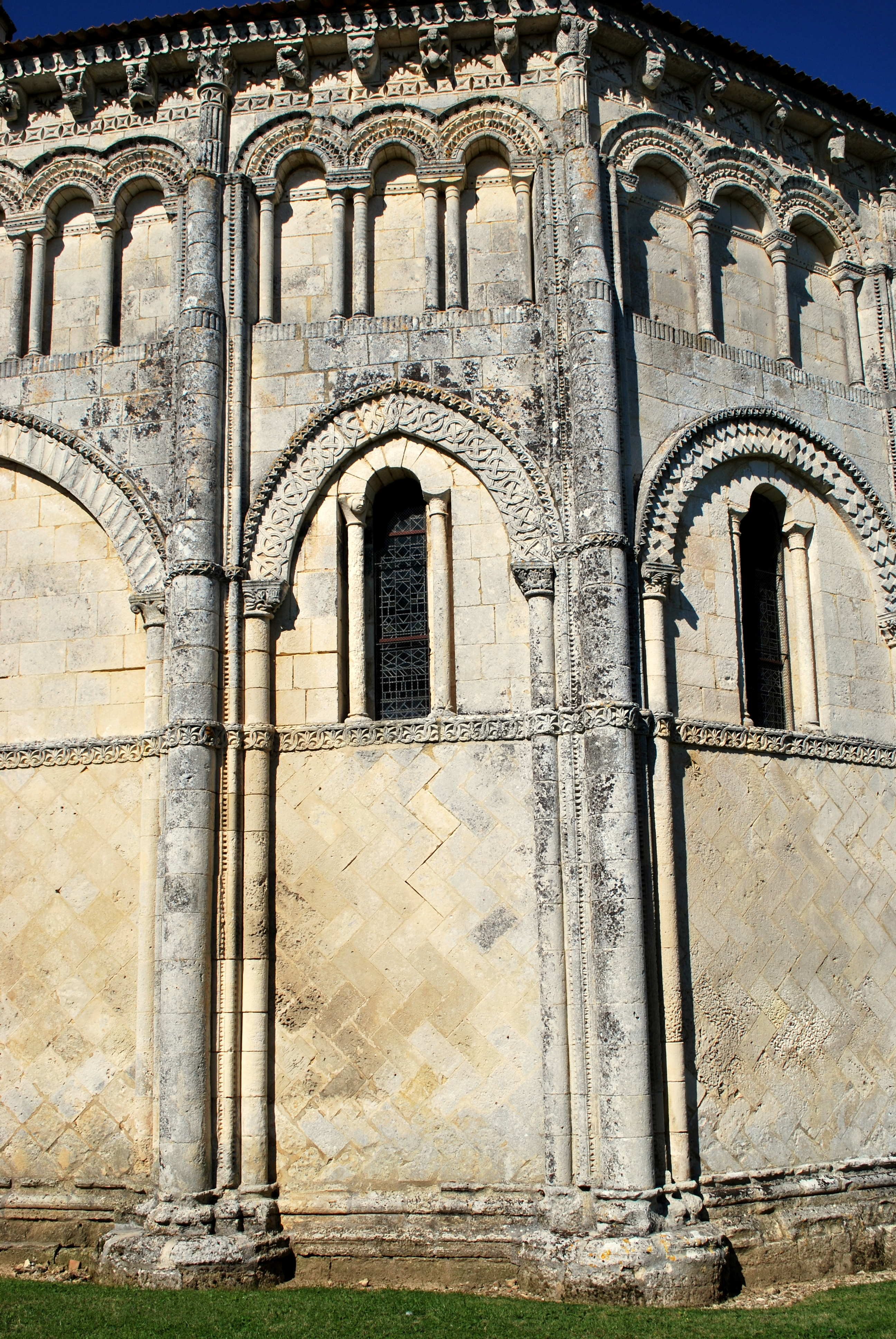 Église Saint-Trojan de Rétaud